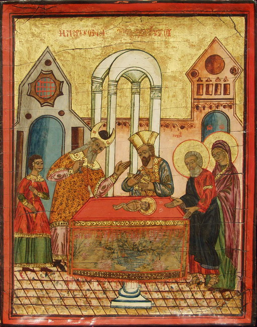 Обрезание Христа Икона середины XVIII в. Провинциальный греческий или малоазийский художественный центр